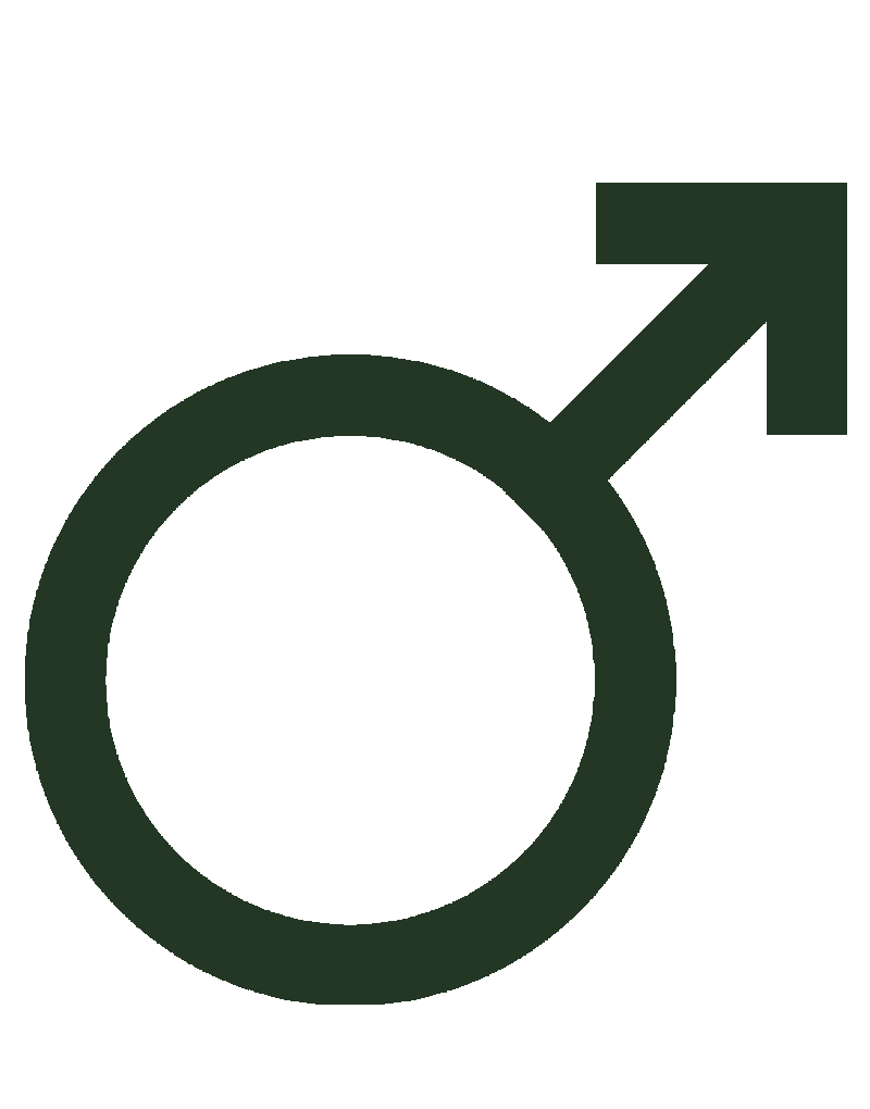 Symbole du Masculin et de l'astre Mars